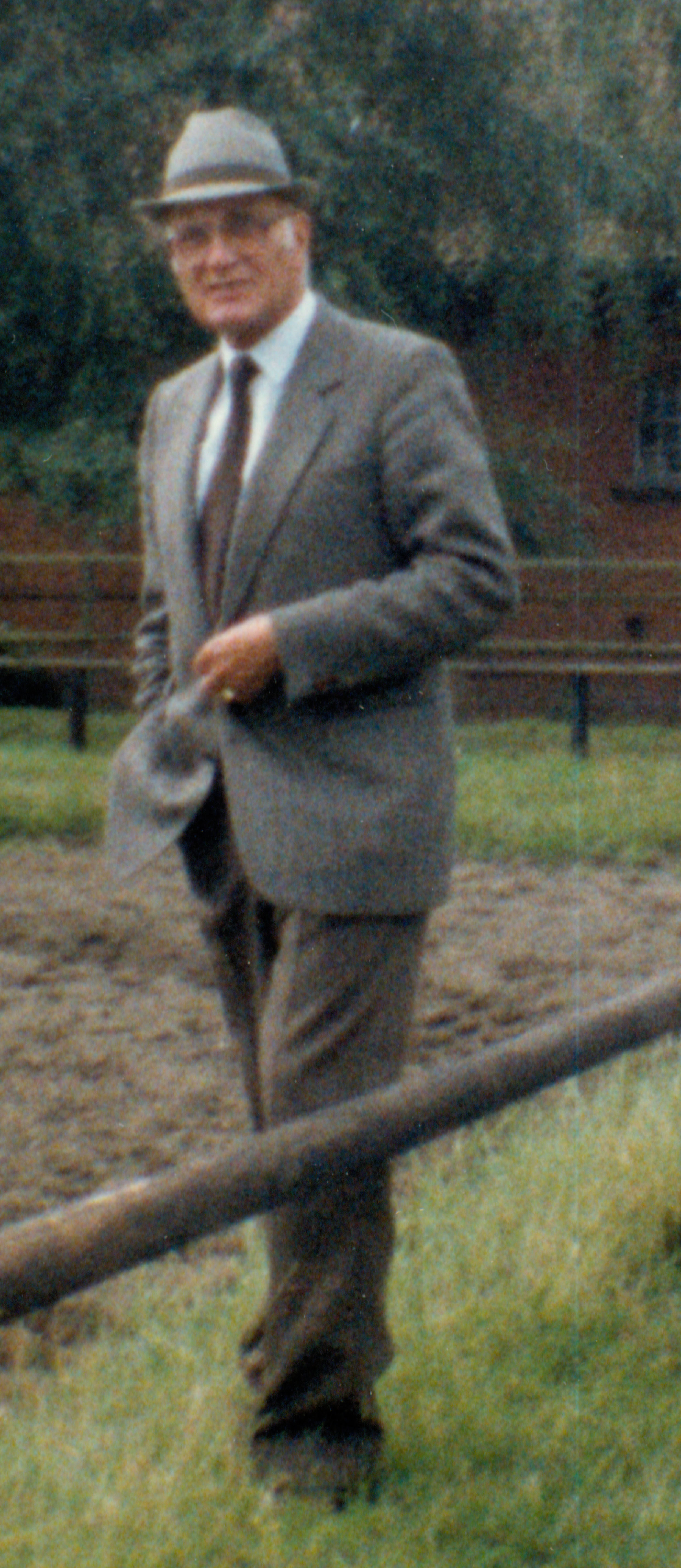 Ausschnitt von wiki/File:Paul_Stecken0001.jpg